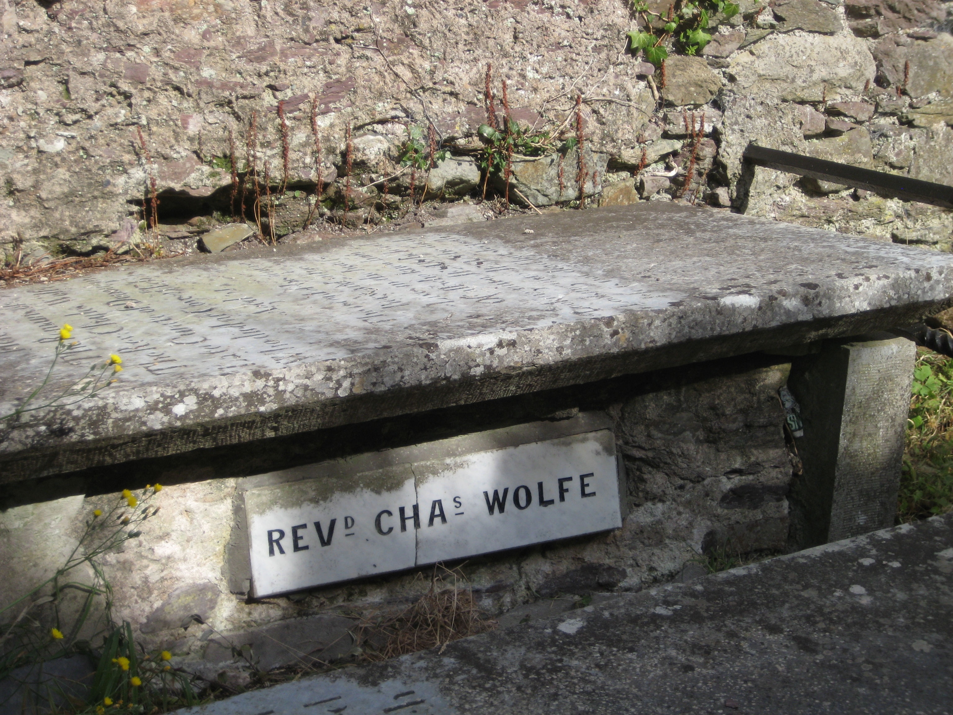 Tombe du poère irlandais Charles Wolfe